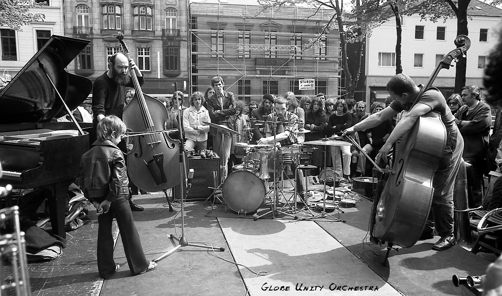 Globe Unity Ochestra, Open Air Konzert in Wuppertal (Laurentiusplatz), 1970-er Jahre